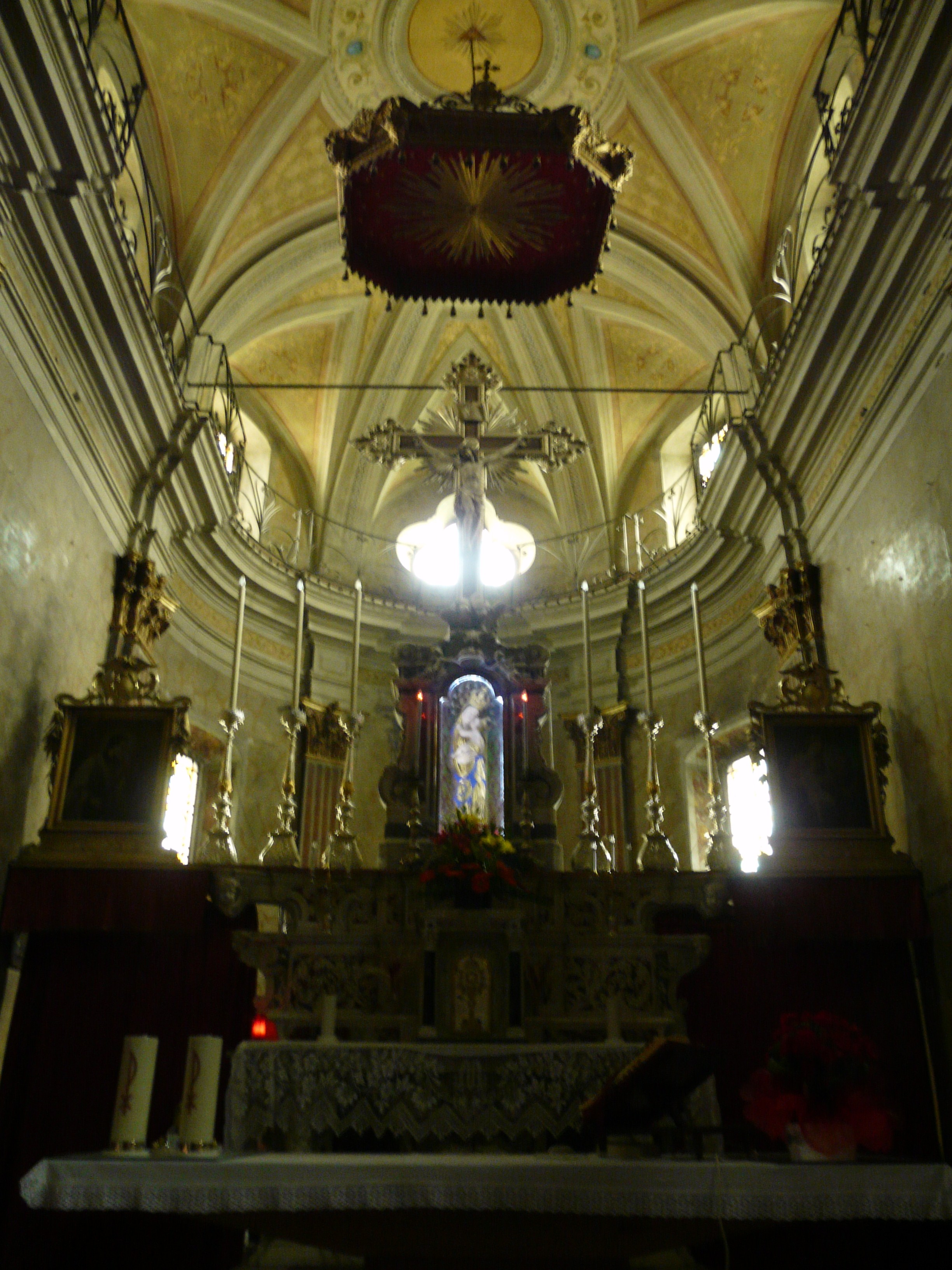 Altare maggiore della chiesa di Santa Maria, Santa Maria del Taro, Tornolo, Emilia-Romagna, Italia